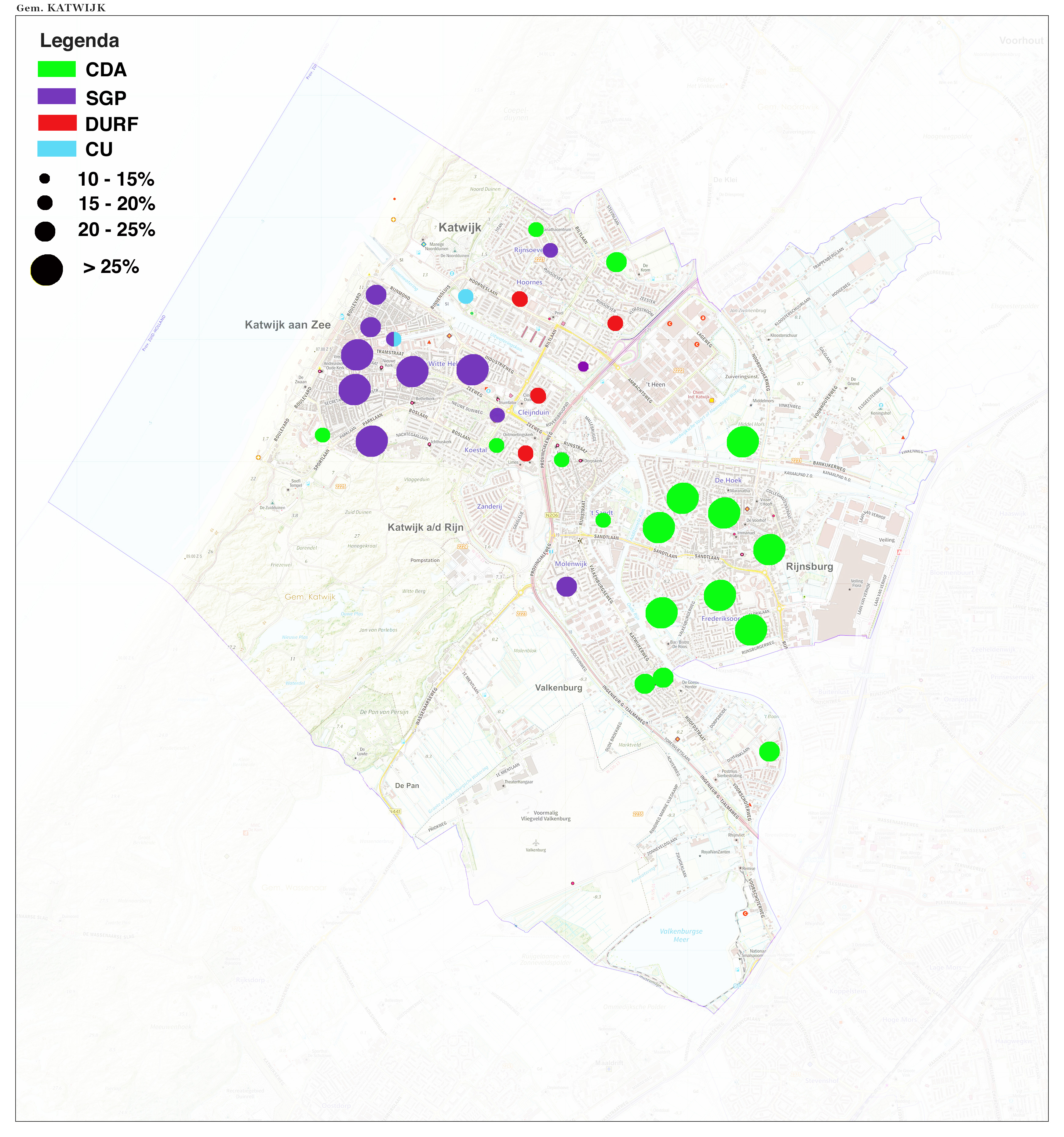 Gemeenteraadverkiezingen Katwijk 2018, overzicht van de grootste partijen per stembureau geprojecteerd op een bewerkte versie van Gem-Katwijk-OpenTopo